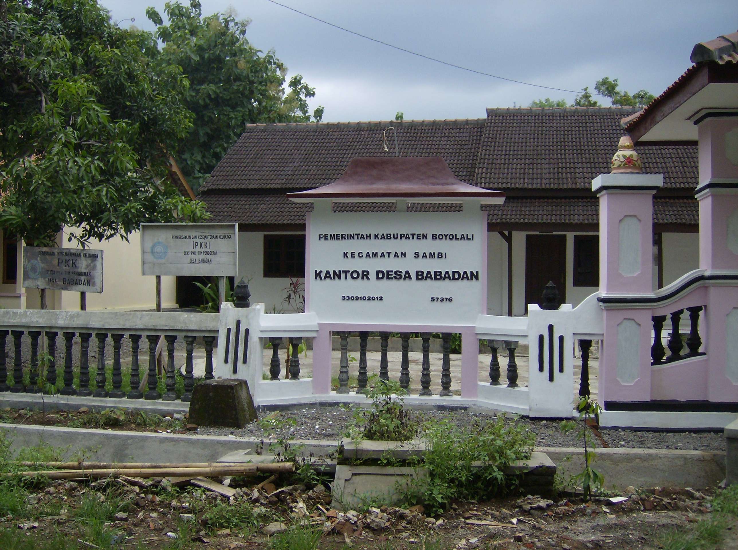 Made by Meursault2004 aka Revo Arka Giri Soekatno